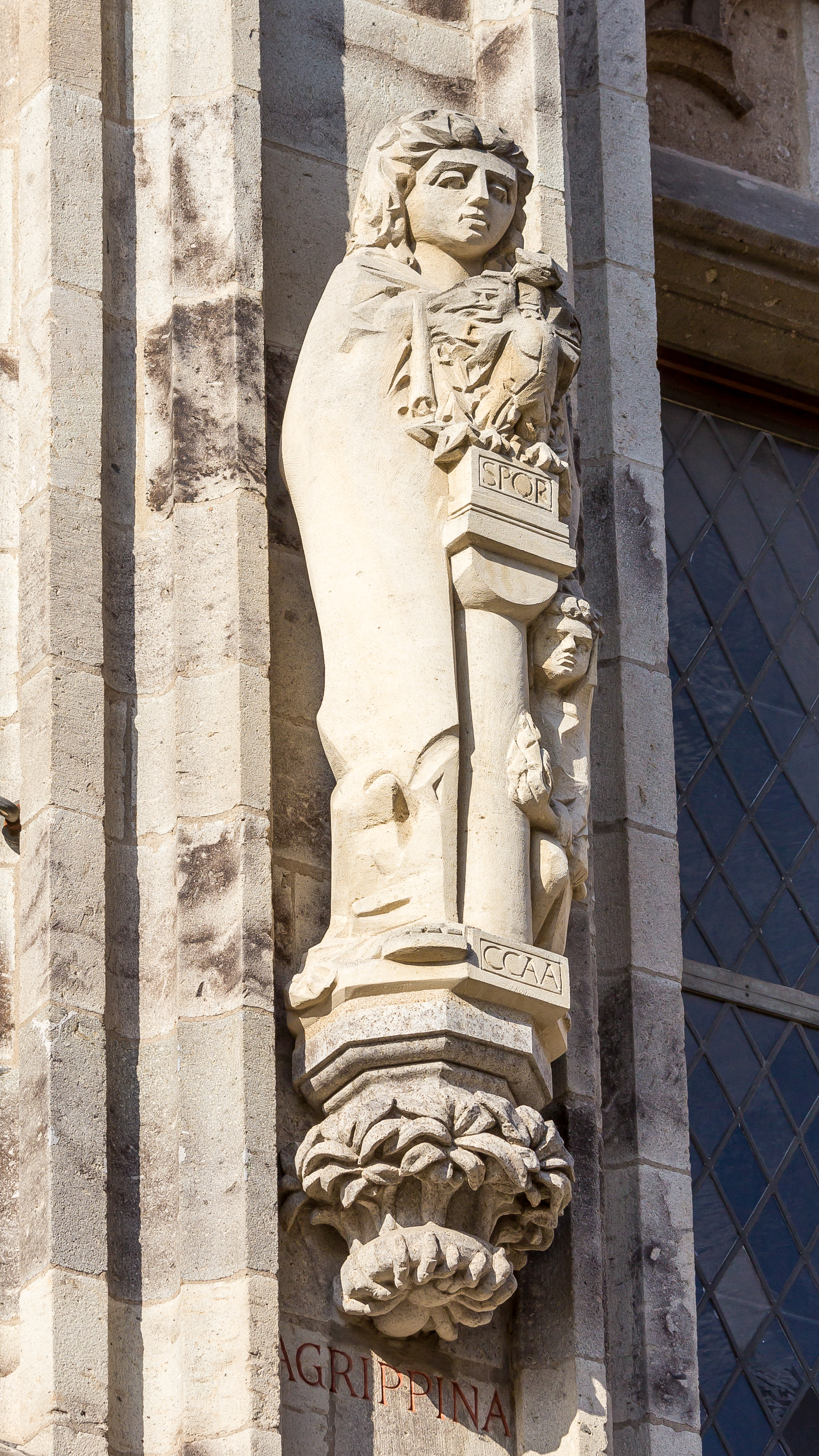 Figur der Agrippina der Jüngeren. Thema der Konsole unter der Statue: Eichenlaub. Bildhauer: Matthias Moritz, 1994